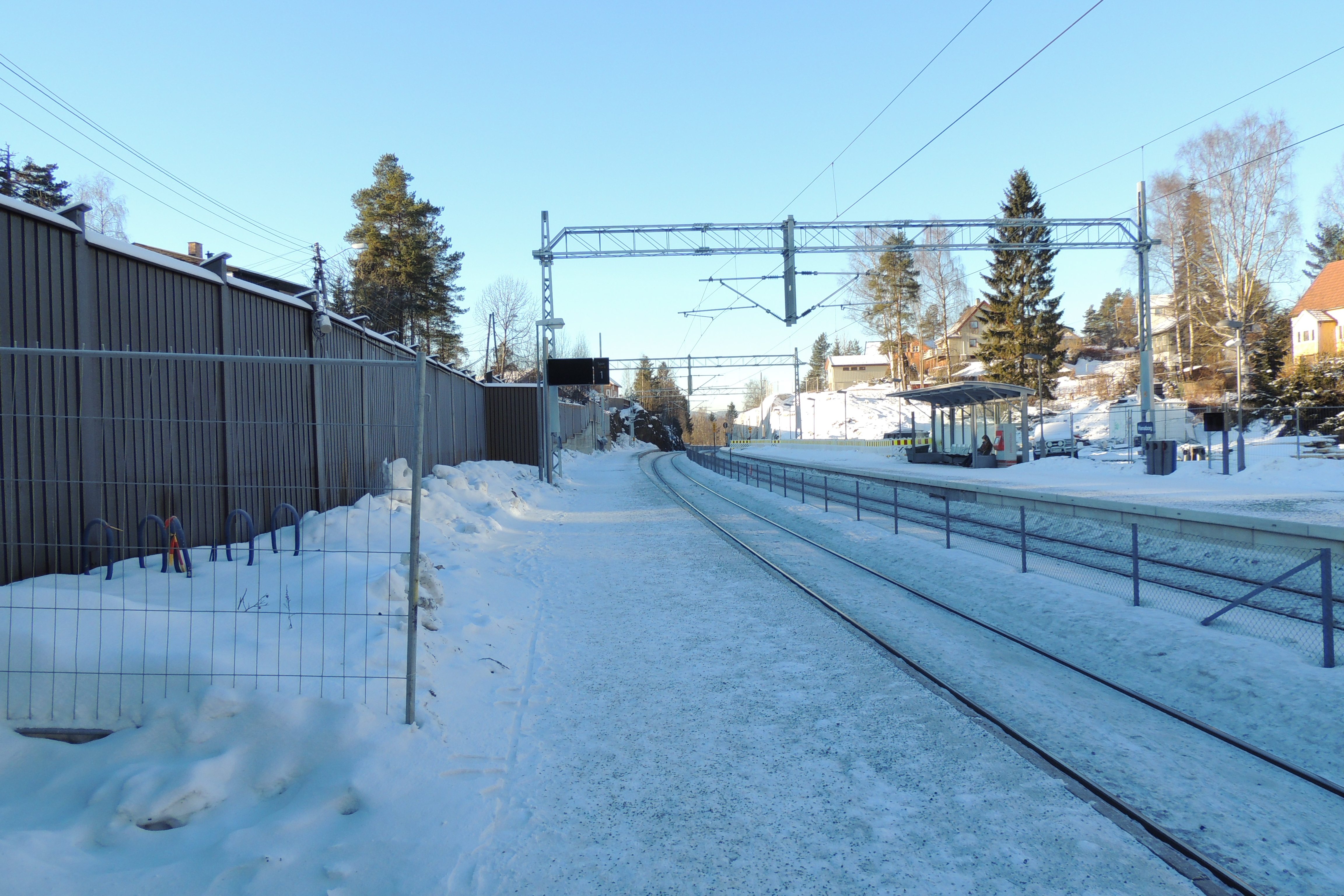 Mot Oslo